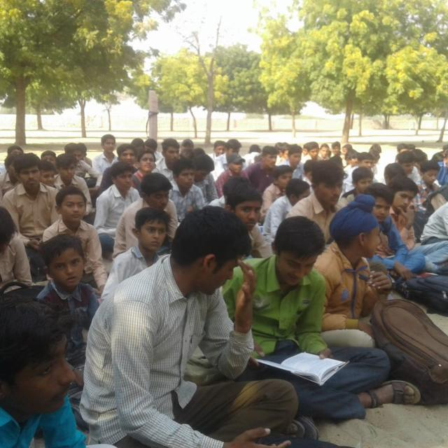 Gsss kelansar